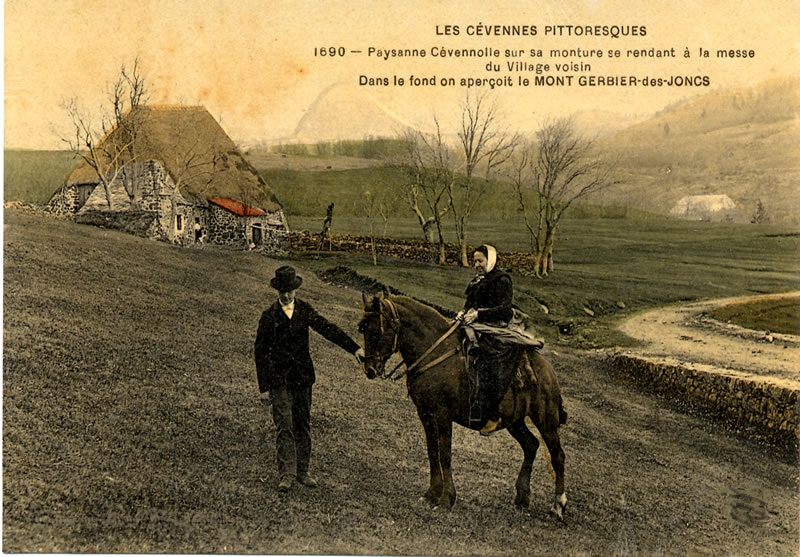 Paysans et chaumière en Ardèche cévenole